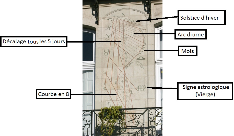 Photographie légendée issue du site